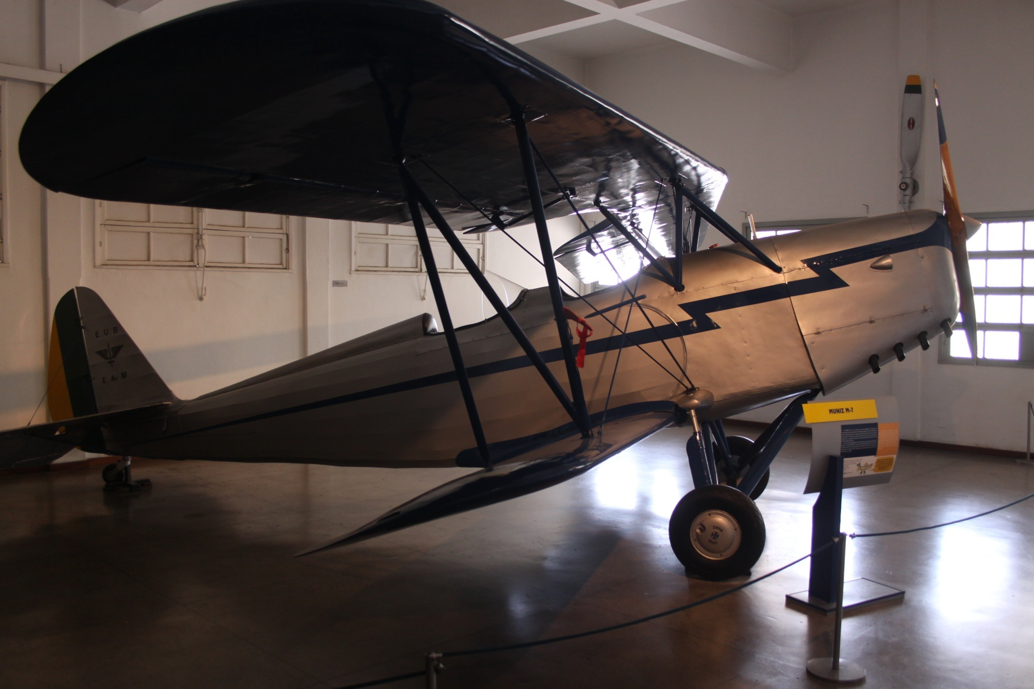 Muniz M-7